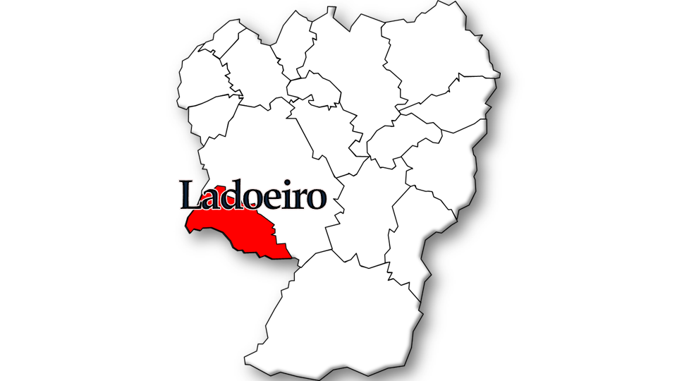 População